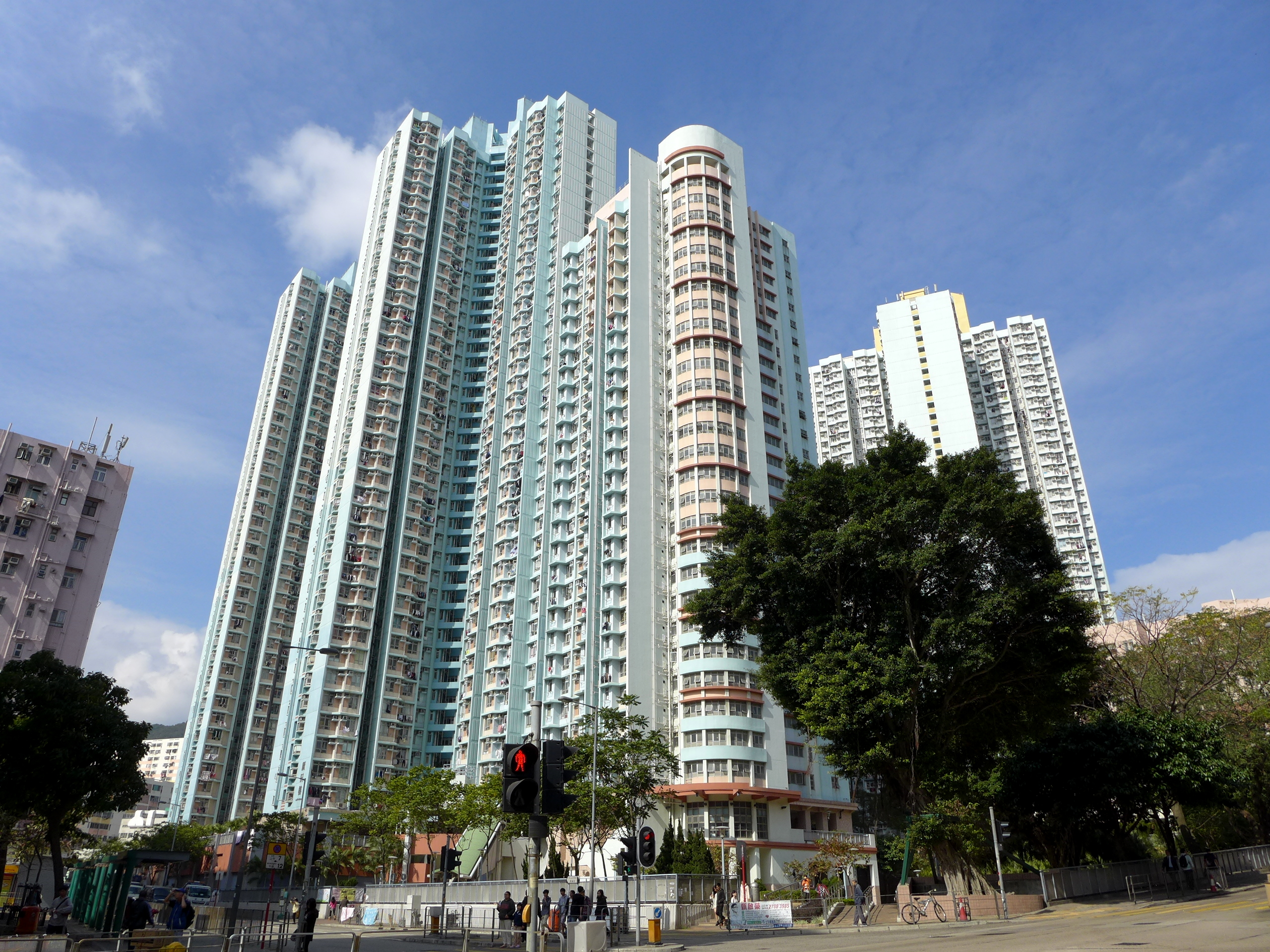 Pak Tin Estate